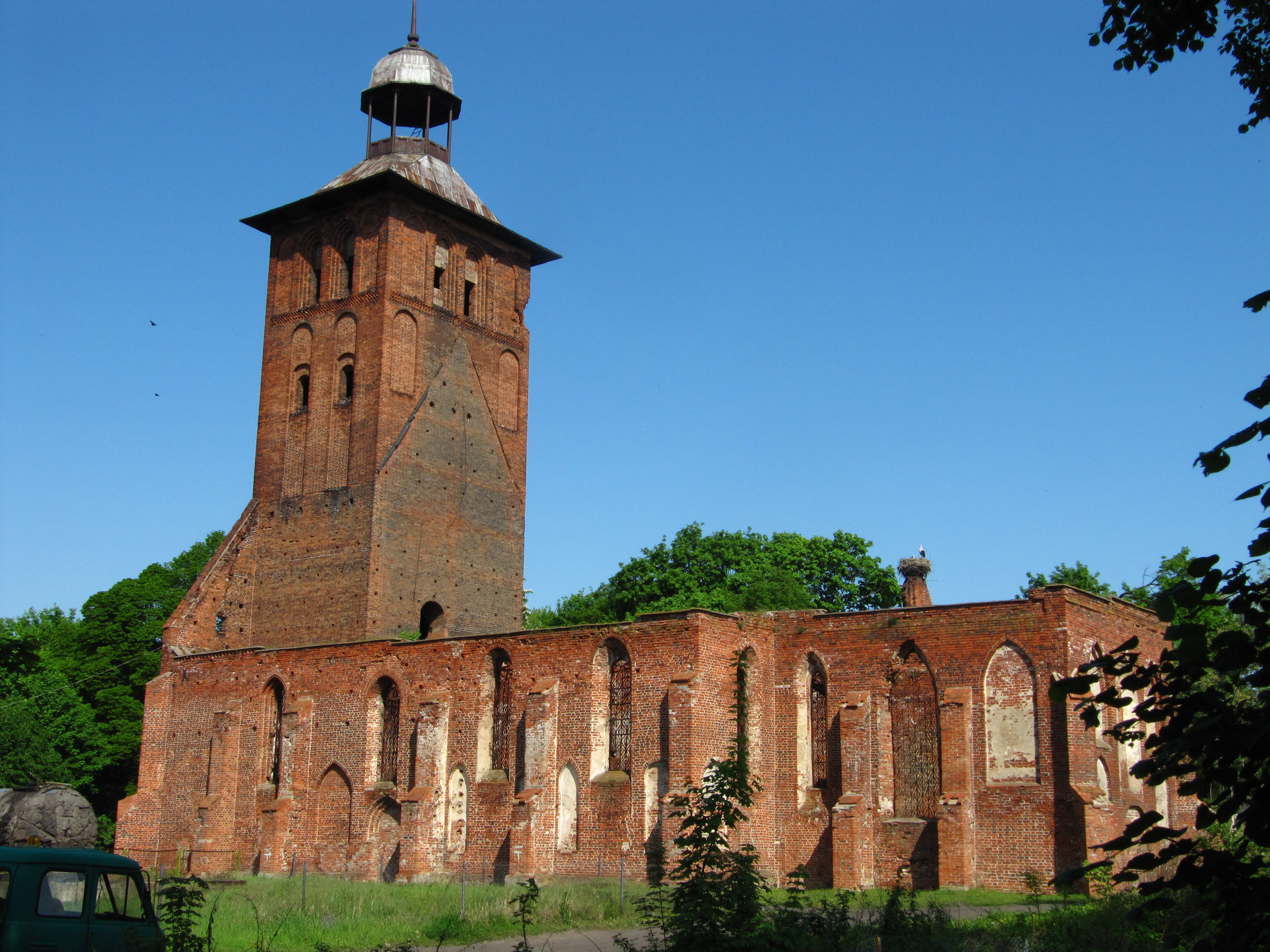 Руины кирхи Святого Якоба: улица Советская, 7, Знаменск, Гвардейский район, Калининградская область